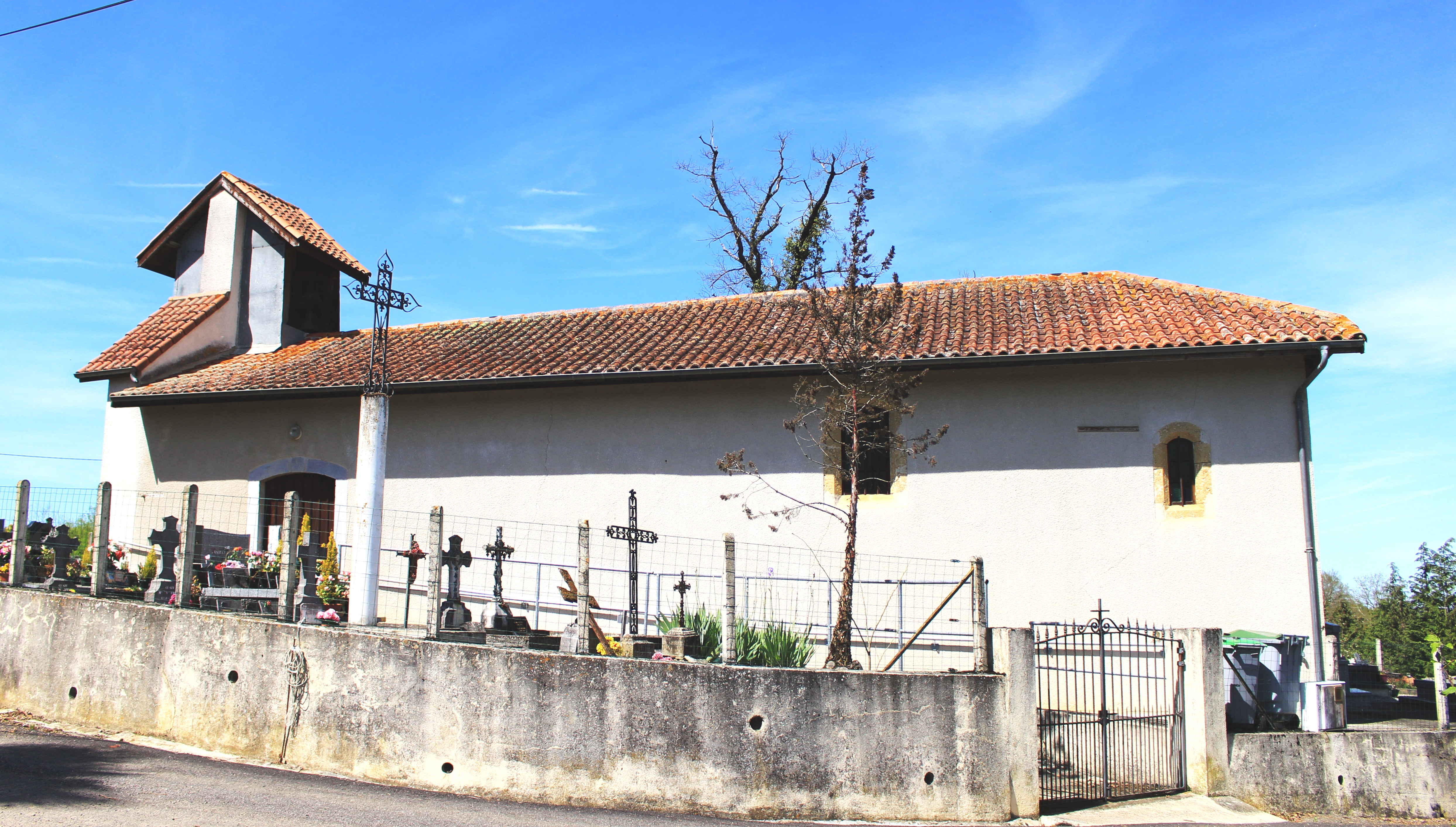 Église Saint-Laurent de Soréac (Hautes-Pyrénées)